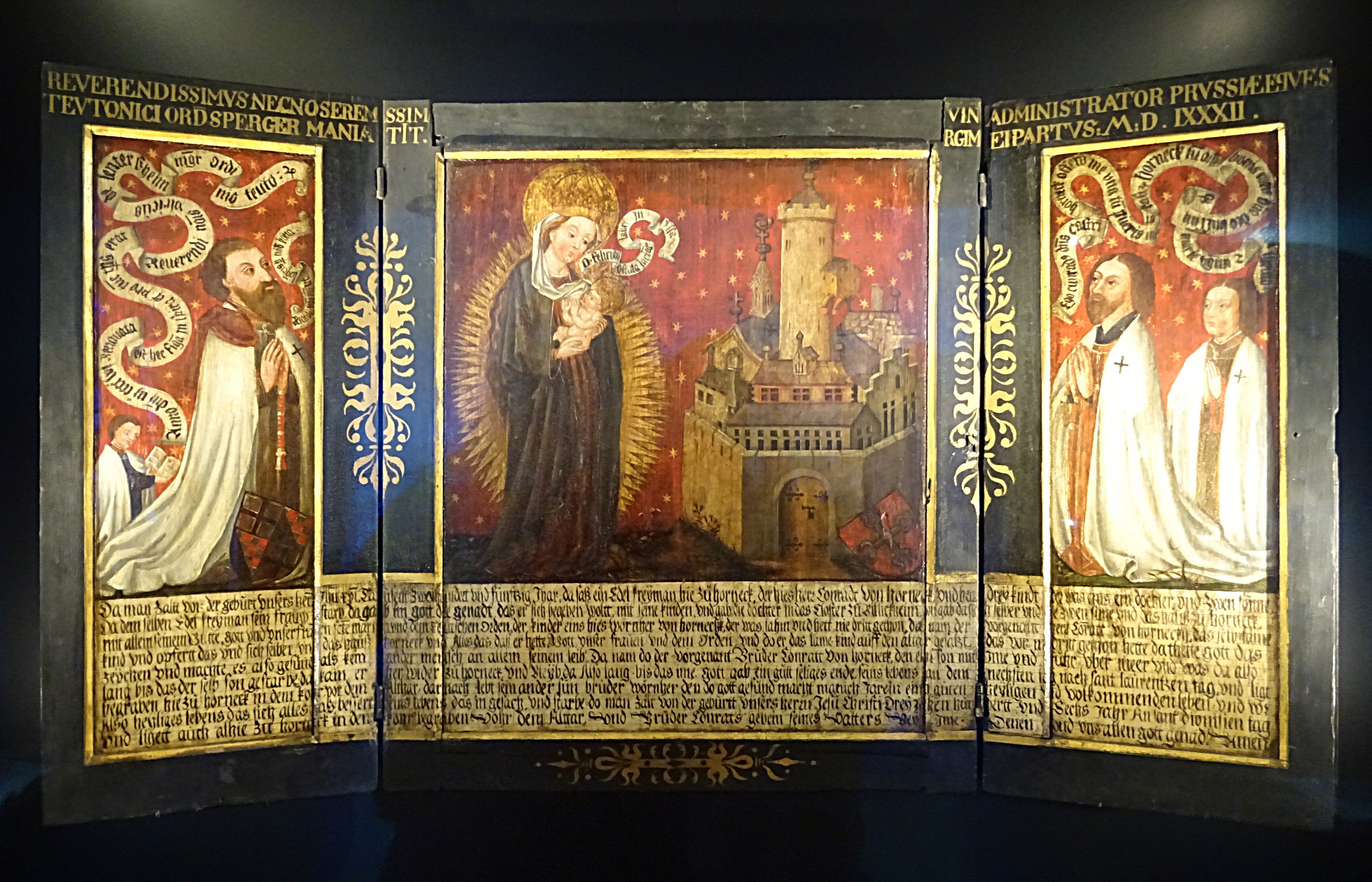 Hornecker Altar von 1582. Das altarartige Gedenkbild erinnert an die Gründung der Deutschordenskommende Horneck im Jahr 1250. Im Mittelpunkt des Triptychons steht die Madonna, der zu Ehren die Stiftung erfolgte. Rechts neben der stilisierten Burg Horneck ist der Stifter der Kommende, Konrad von Horneck, mit seinem Sohn zu sehen. Ihm gegenüber kniet der Auftraggeber des Bildes, Deutschmeister Ulrich von Lentersheim mit einem Begleiter (alle tragen Ordensmäntel). Das Original befindet sich auf der Veste Heldburg.